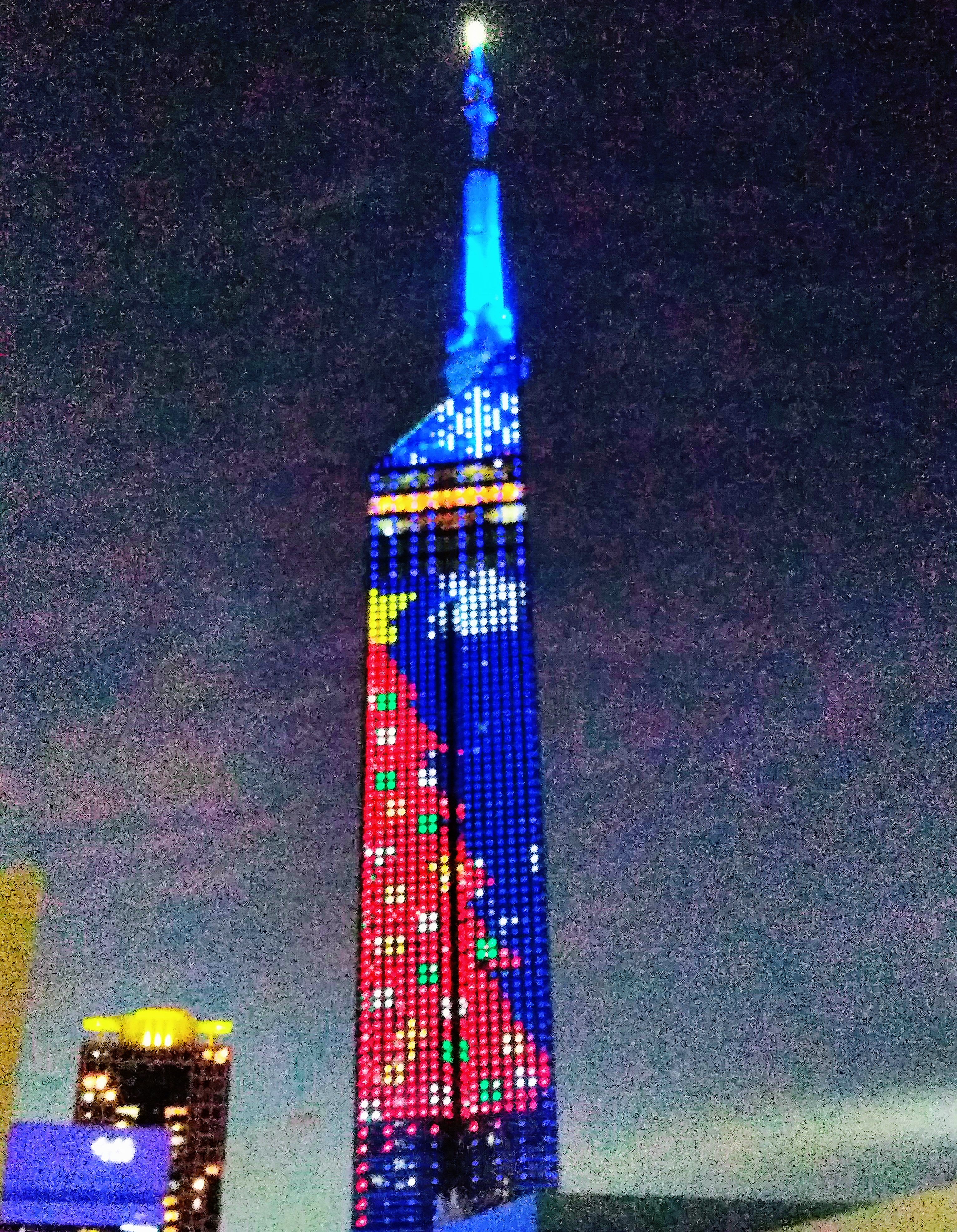 福岡タワーの赤色のクリスマスツリーのイルミネーション